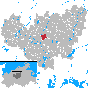 Glasewitz in Mecklenburg-Vorpommern - District Güstrow